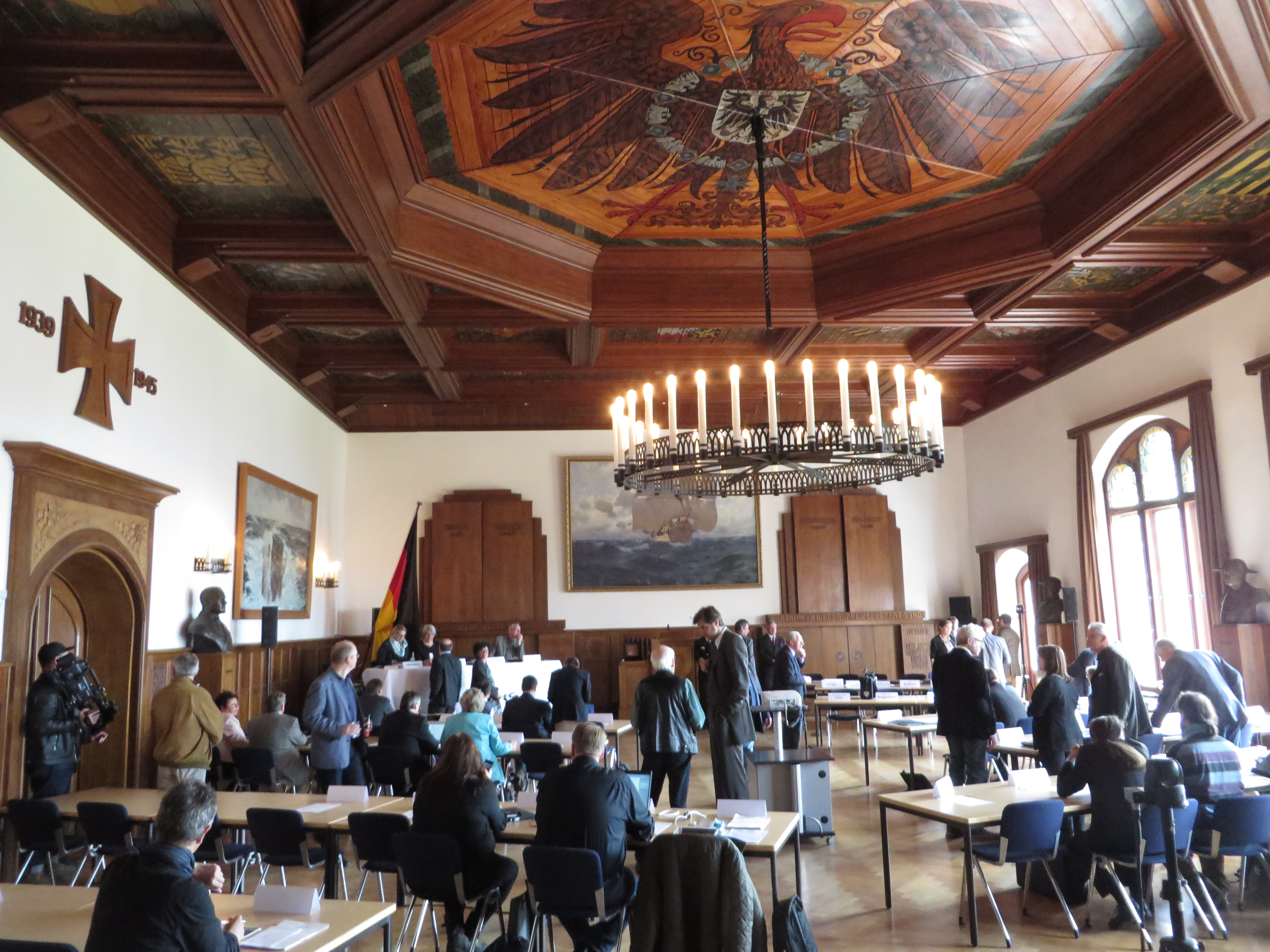 Flensburger Ratsversammlung, 7. Mai 2015, MSM-Aula, Zum Beginn, Öffentlicher Teil, Bild 07